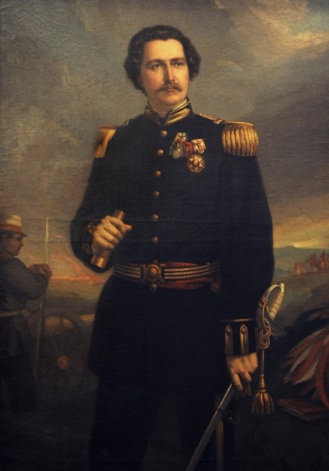 O escritor Alfredo d'Escragnolle Taunay (1843-1899), autor de "Inocência".